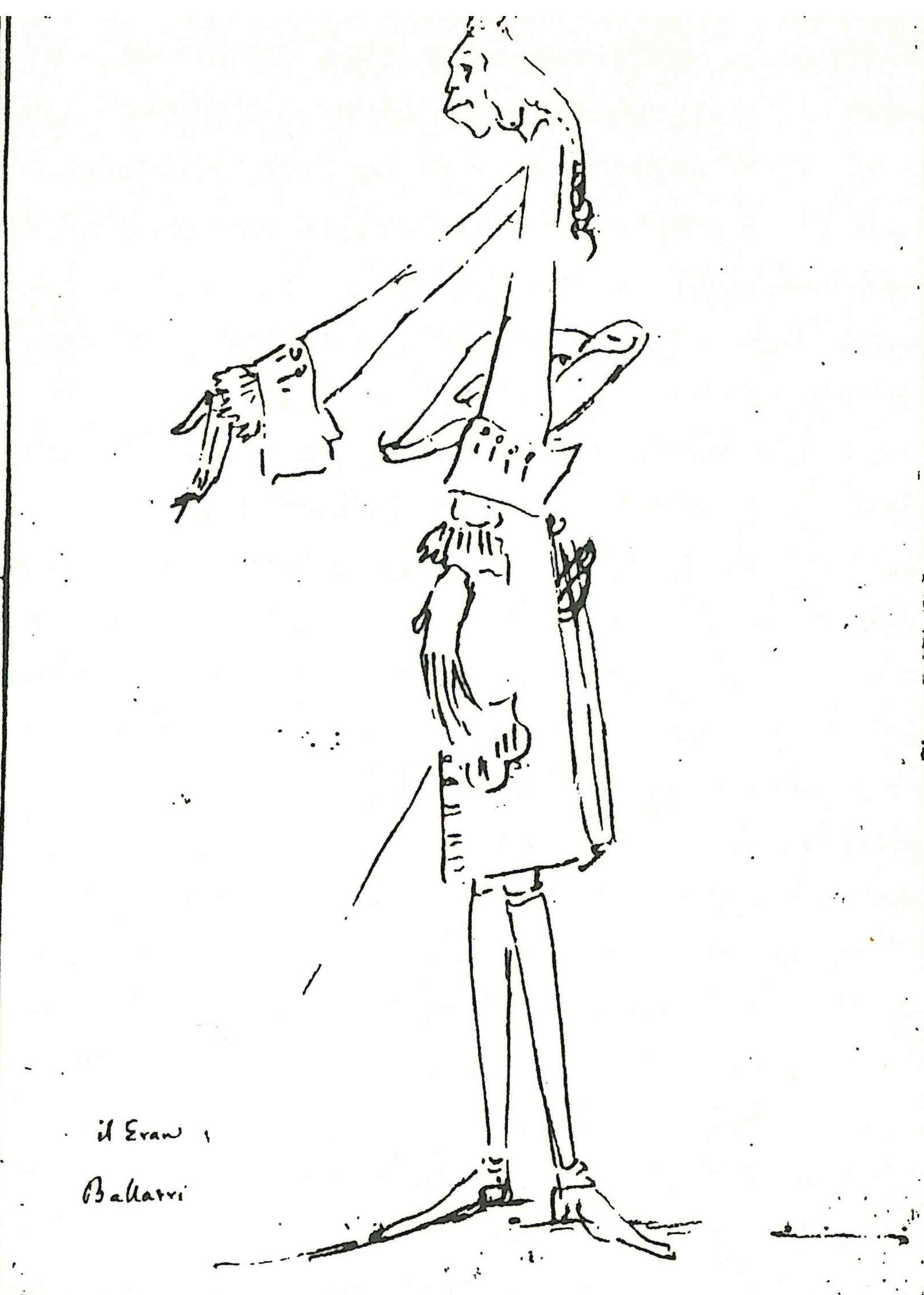 Der Kastrat Filippo Balatri (1682–1756) Zeichnung von Pier Leone Ghezzi (1674–1755) DescriptionItalian caricaturist and painterDate of birth/death 28 June 1674 6 March 1755Location of birth/death Rome RomeWork location Florence (1711); Rome (1695–1755)Authority control : Q429072 VIAF: 17453553 ISNI: 0000 0001 0844 443X ULAN: 500014963 LCCN: n86091499 NLA: 36048180 WorldCat creator QS:P170,Q429072 Scan aus Hubert Ortkemper: Engel wider Willen: Die Welt der Kastraten. Henschel, Berlin 1993, S. 41